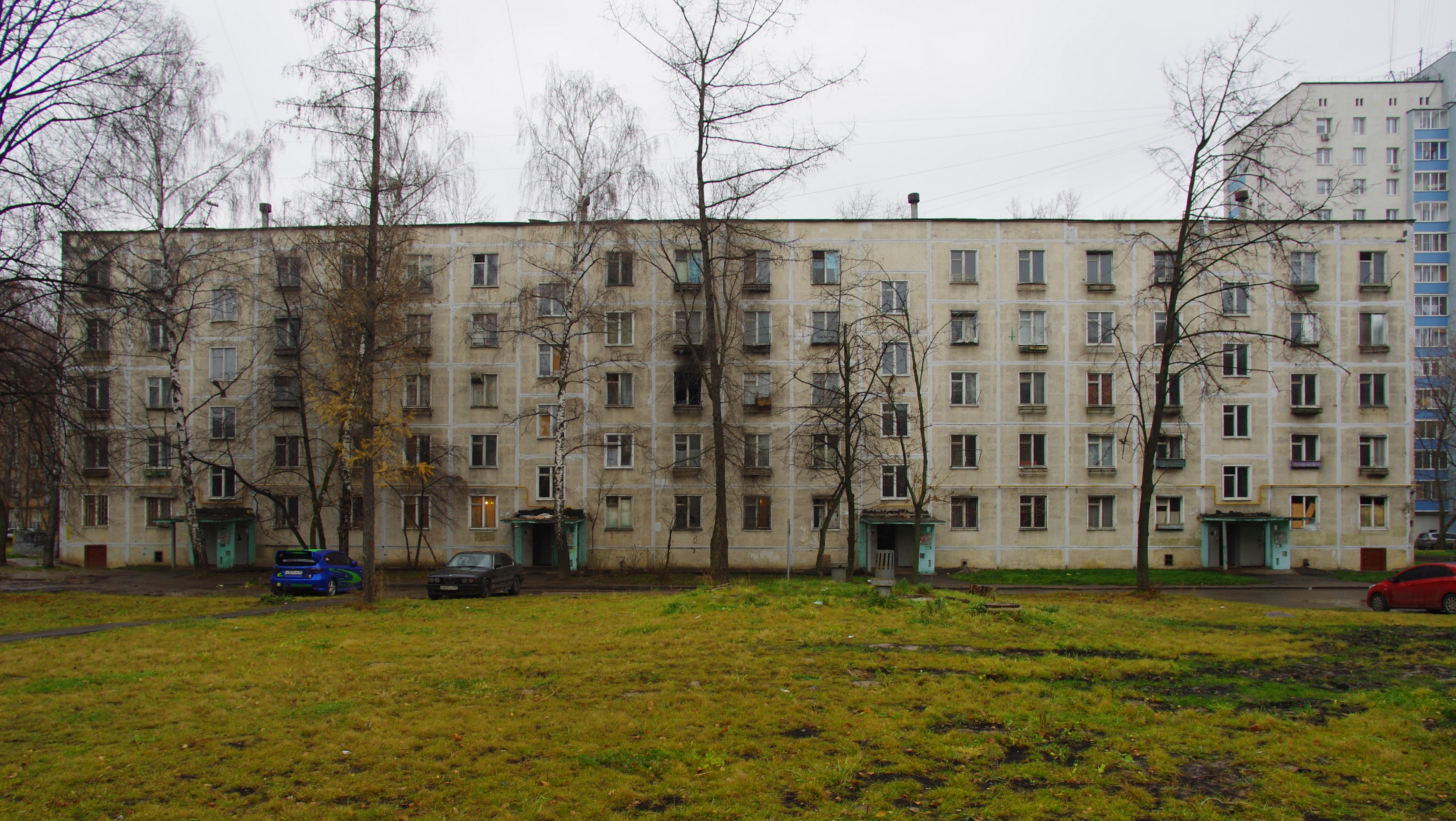 Полярная улица, 15 к2